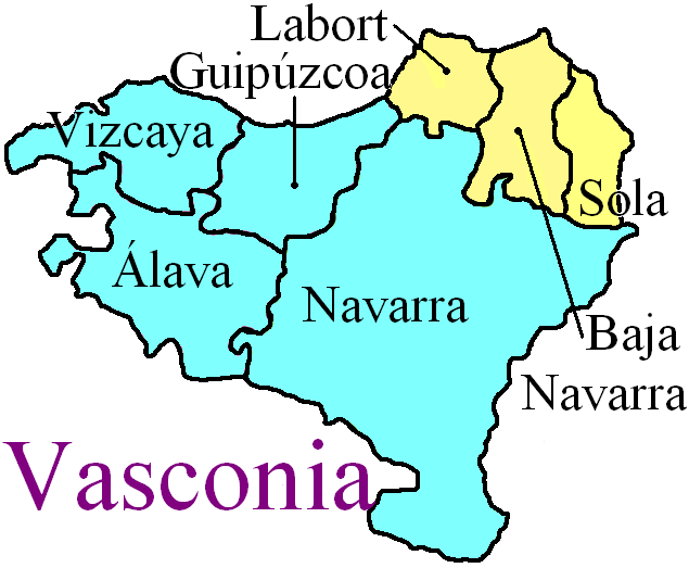 Mapa de Vasconia España Francia